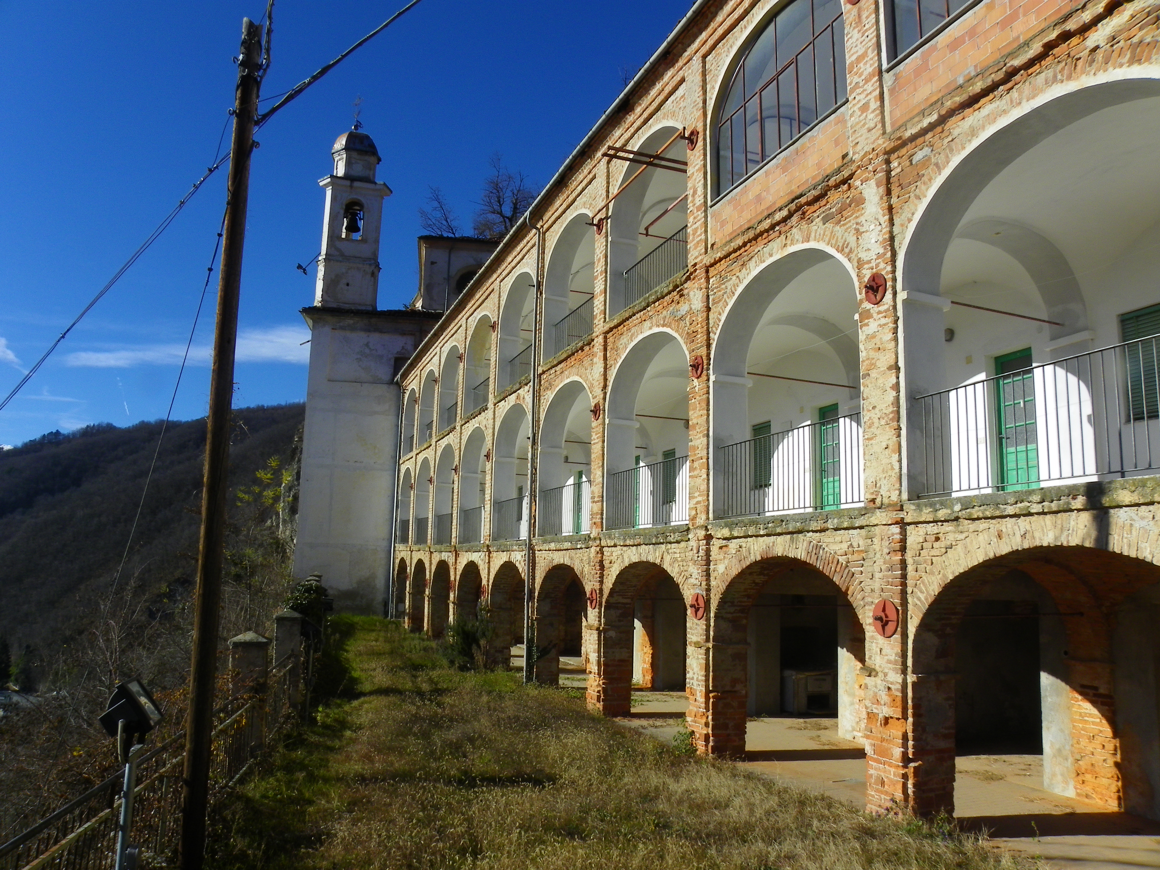 Vista dell'antico monastero